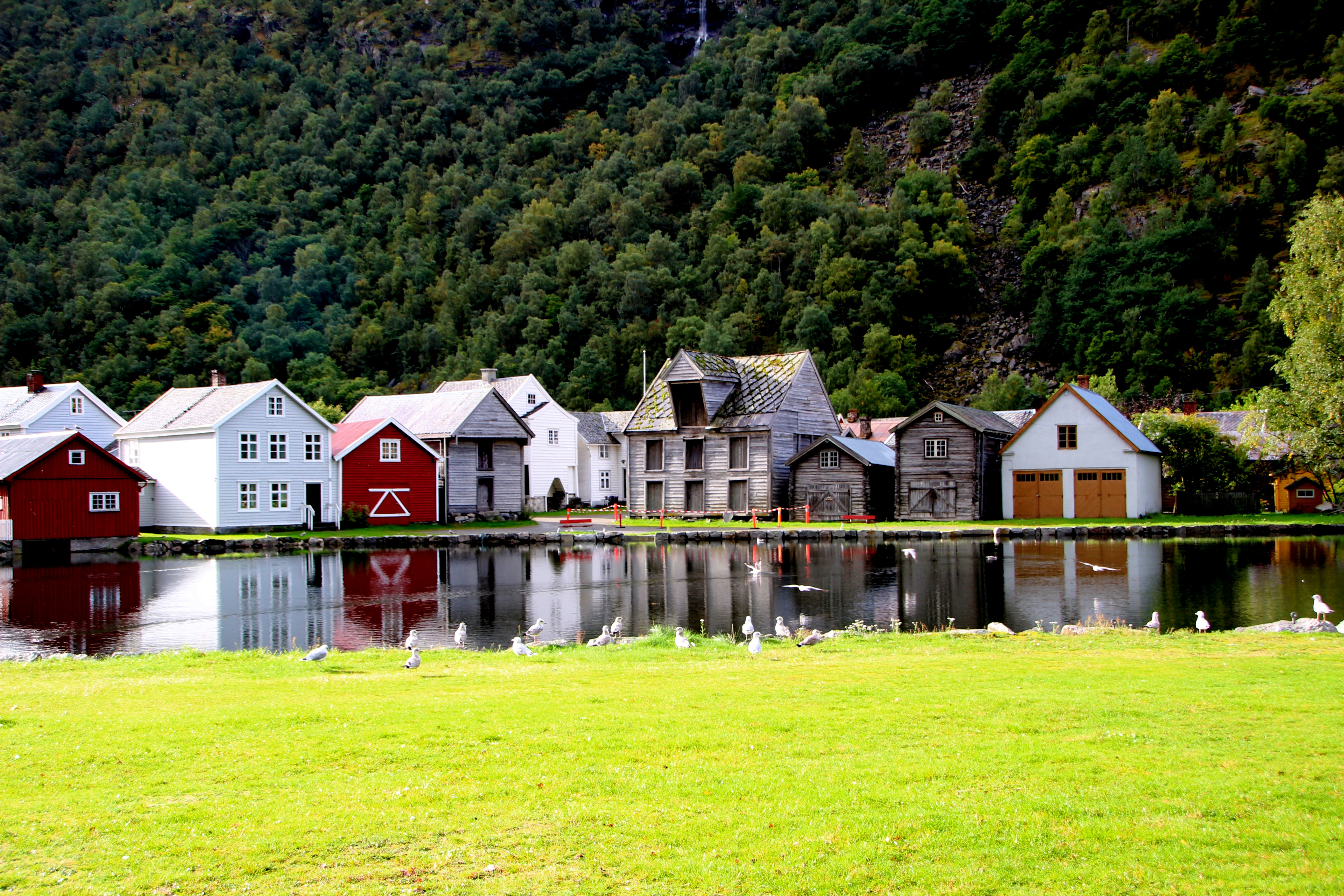 Foto: Jan Christian Jerving. Bidrag til fotokonkurransen "Kulturminne i Sogn og Fjordane"